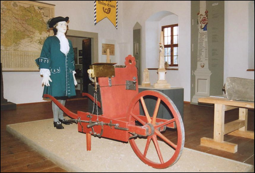 Lauenstein: „Einzelrad“ im Osterzgebirgsmuseum Schloss Lauenstein. Das Einzelrad diente der Entfernungsbestimmung und wurde von Adam Friedrich Zürner (bzw. vielmehr seinen Gehilfen) bei der Vermessung Kursachsens Anfang des 18. Jahrhunderts verwendet. Auf Grundlage der ermittelten Entfernungen wurden ab 1722 Kursächsische Postmeilensäulen und Meilensteine aufgestellt.